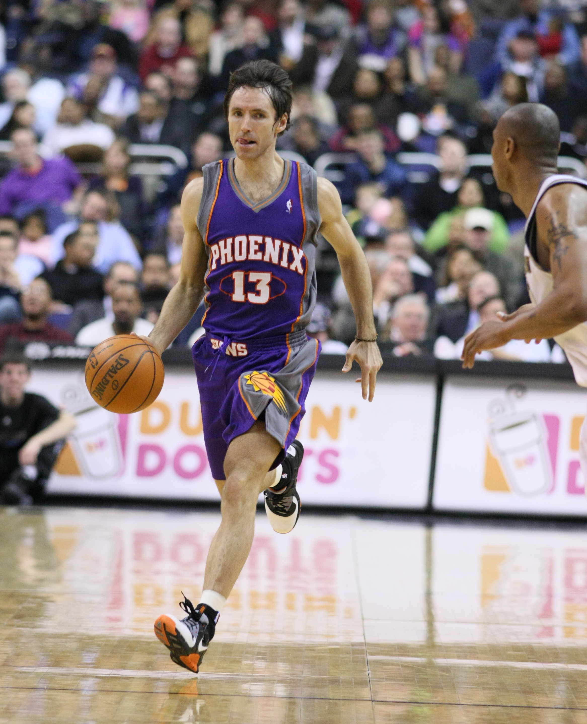 El jugador canadiense de baloncesto Steve Nash.